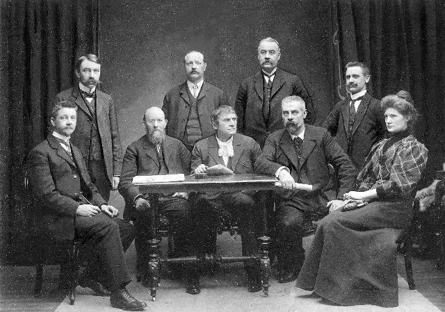 Arbeiderpartiets sentralstyre 1906 - 1909. Sittende fra venstre: Magnus Nilssen, Christian Holtermann Knudsen, Oscar Nissen, Carl Jeppesen og Martha Tynæs. Bak fra venstre: Arnt Aamodt, Ole O. Lian, Johan Karlgren og Johan Nygaard.